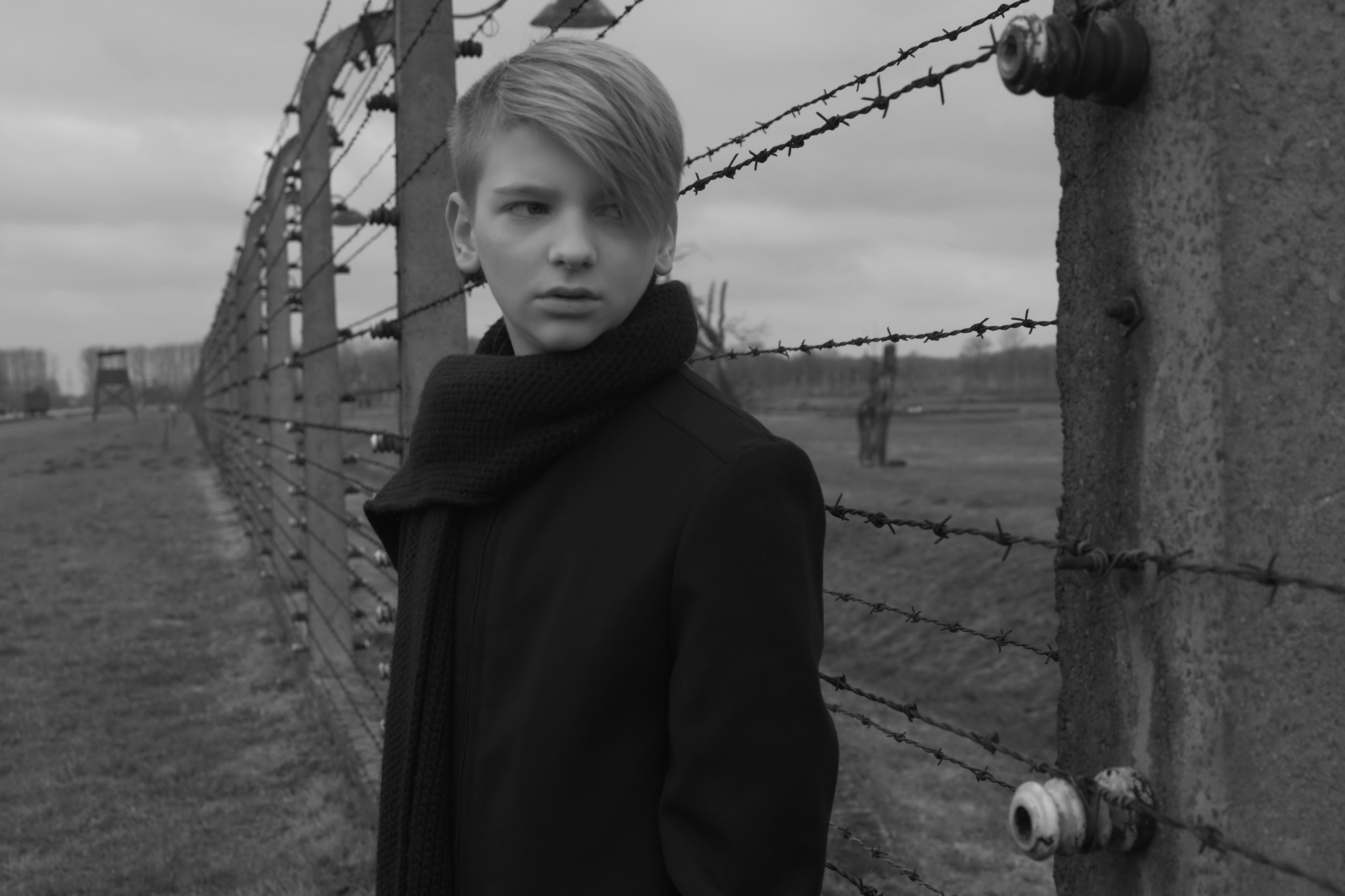 Съемки фильма "Помним", лагерь смерти "Аушвиц", Польша, декабрь, 2018 г